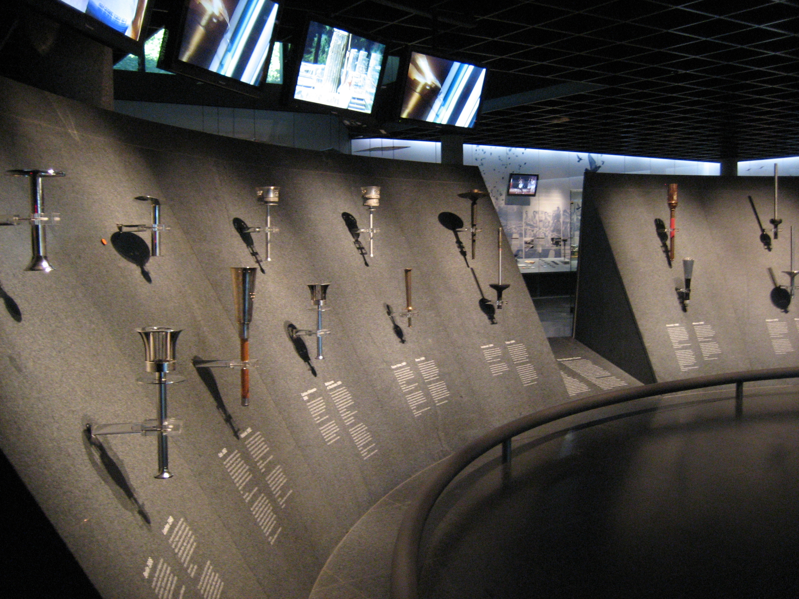 Olympic Flames, CIO Museum, Lausanne, Switzerland